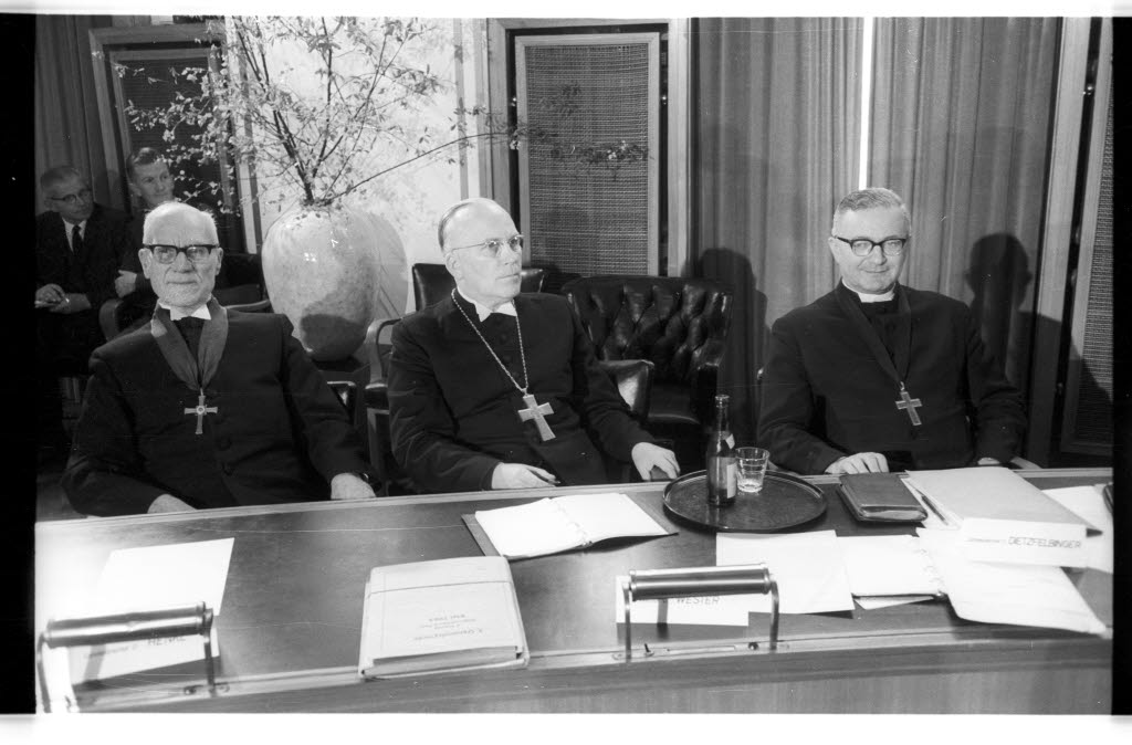 Eröffnung der ersten Arbeitssitzung im Ratssaal im Rathaus. Im Bild Landesbischof von Schaumburg-Lippe Wilhelm Henke (links), Bischof Reinhard Wester (Bildmitte), Landesbischof von Bayern Ernst Dietzfelbinger (rechts).